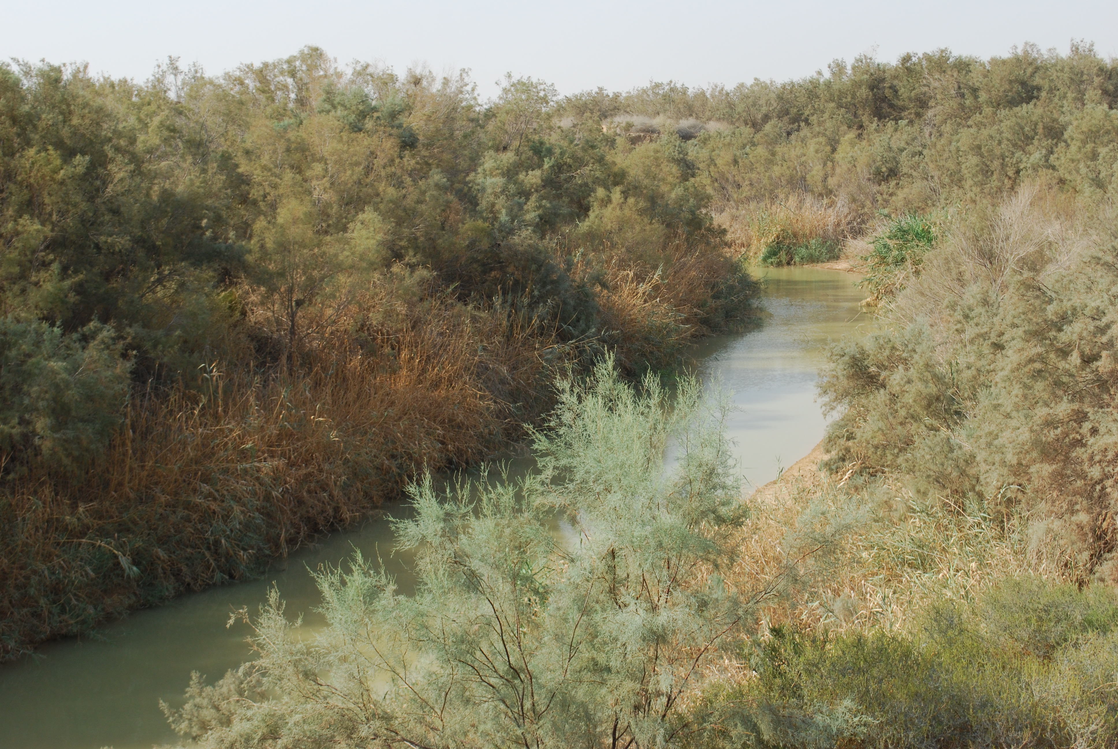 Le Jourdain au site du Baptême, en Jordanie.